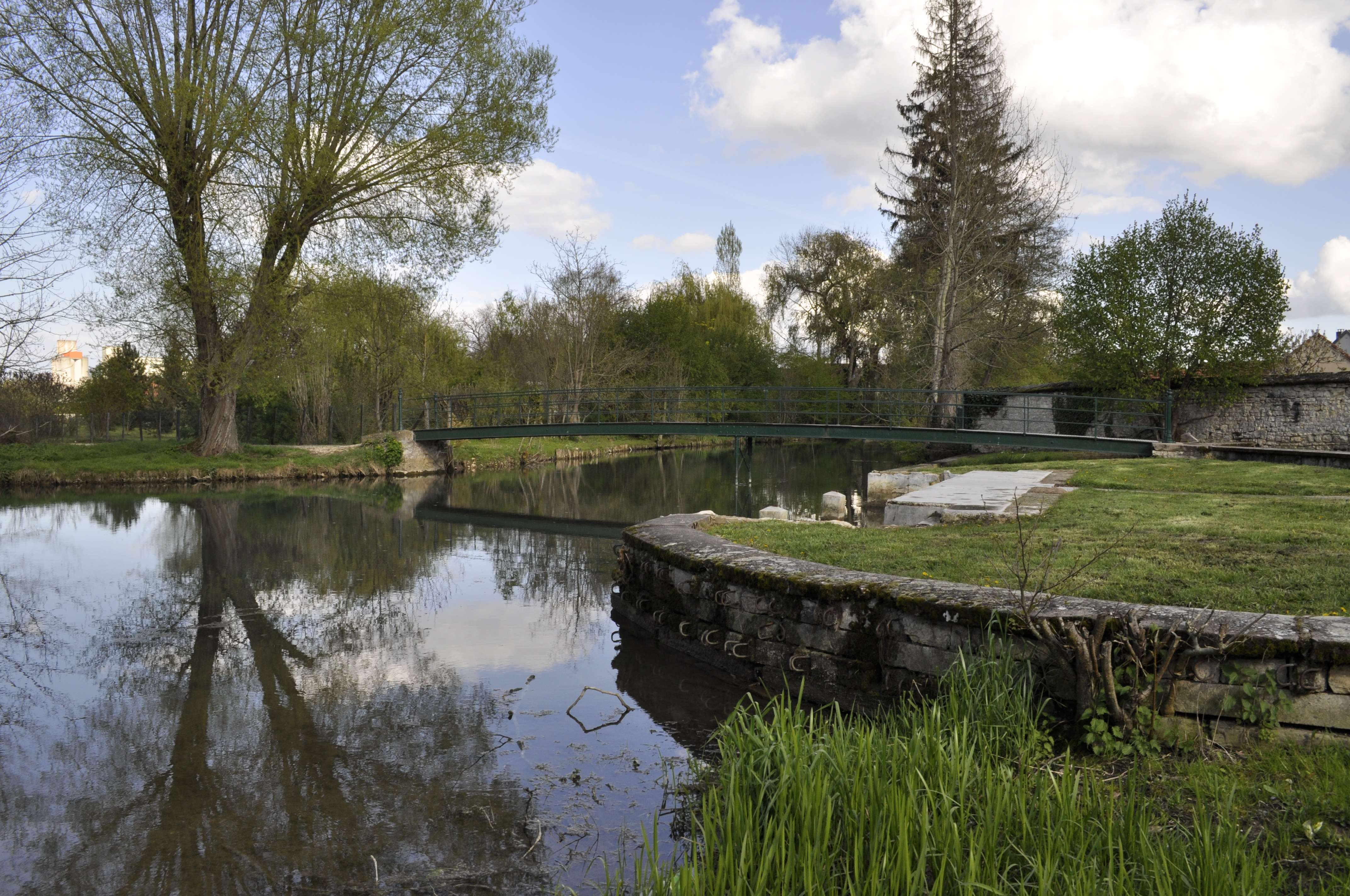 La Bèze à Mirebeau-sur-Bèze, rue Pépin.